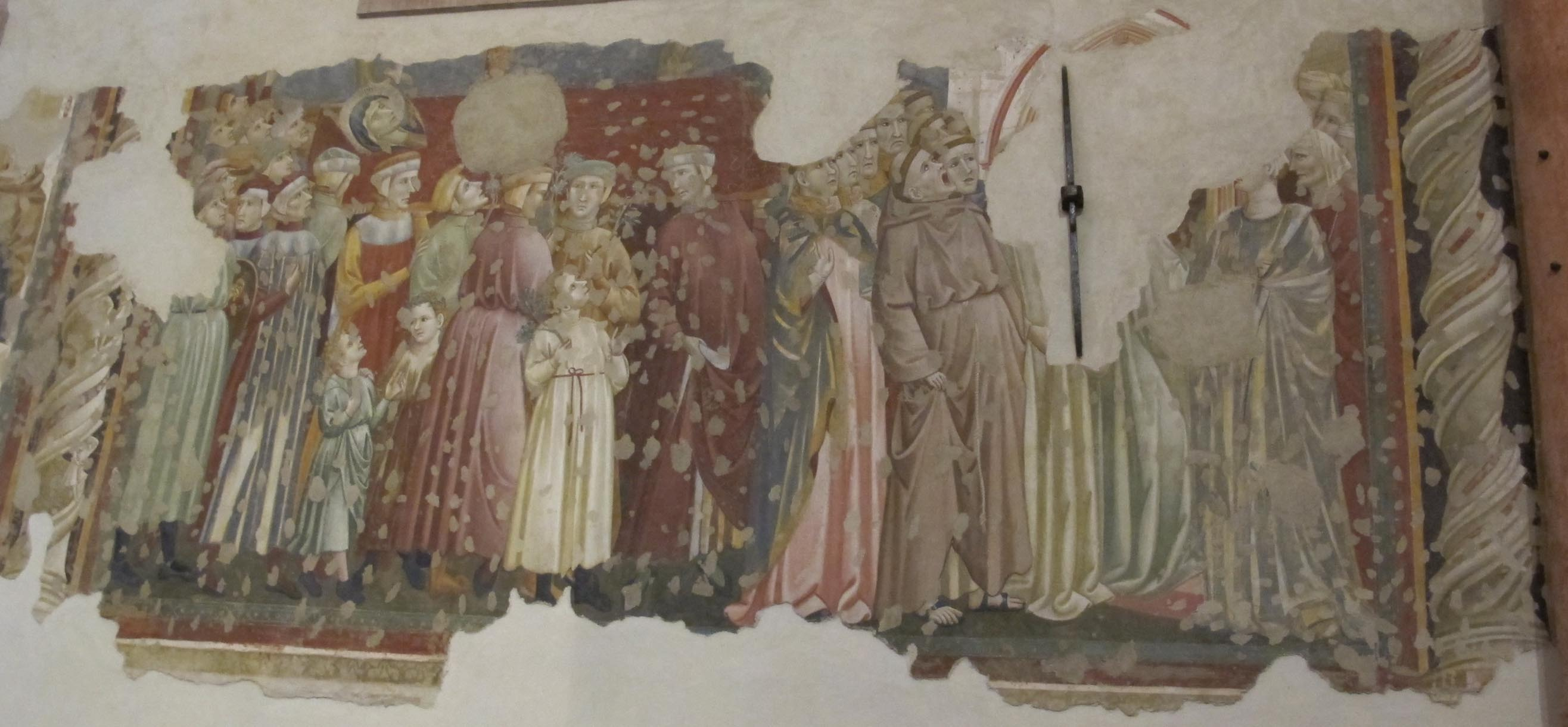 Assisi, santa chiara, interno, maestro espressionista di santa Chiara, trasporto di santa chiara